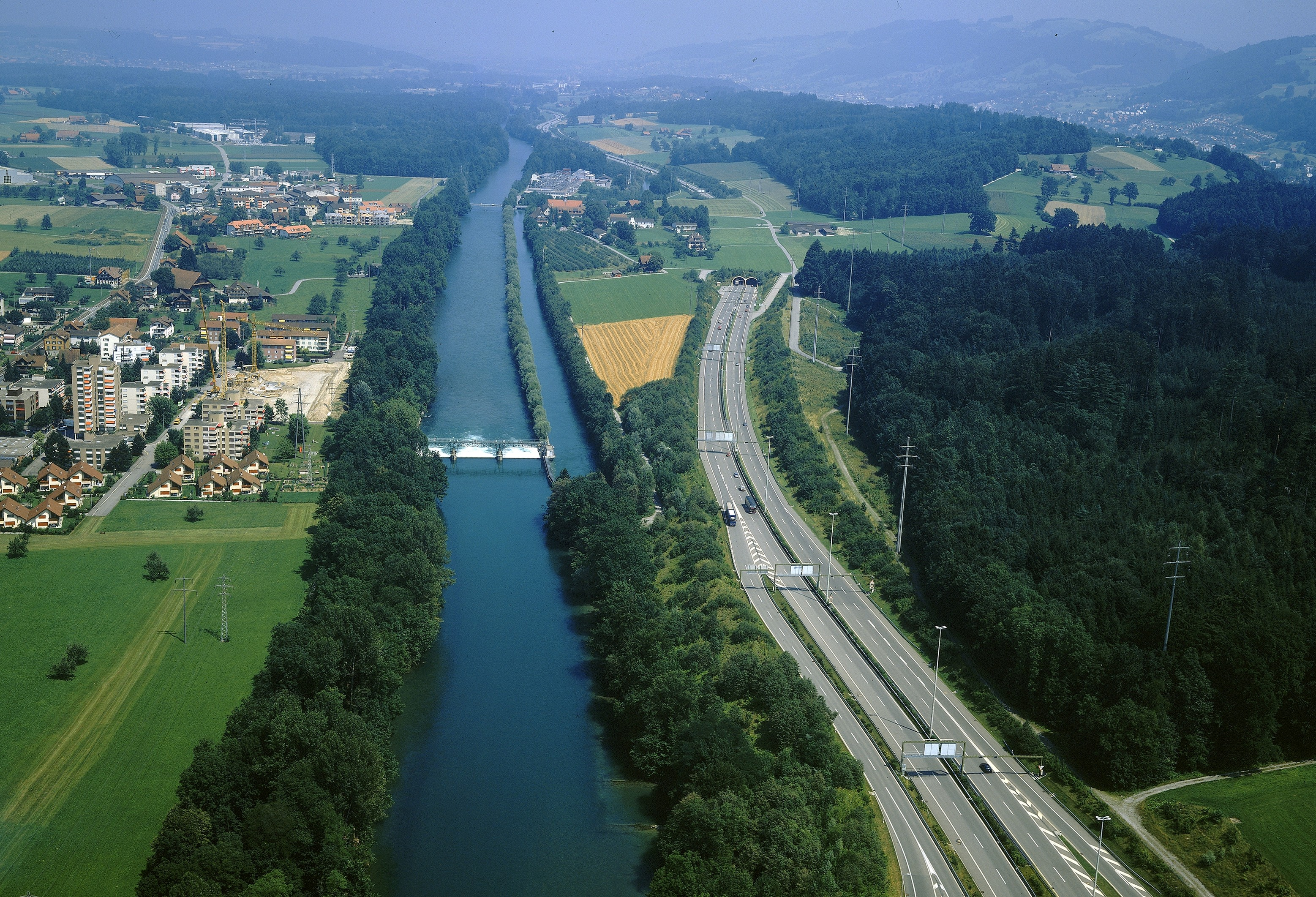 Reuss und Reusskanal bei Rathausen LU, Schweiz 1991